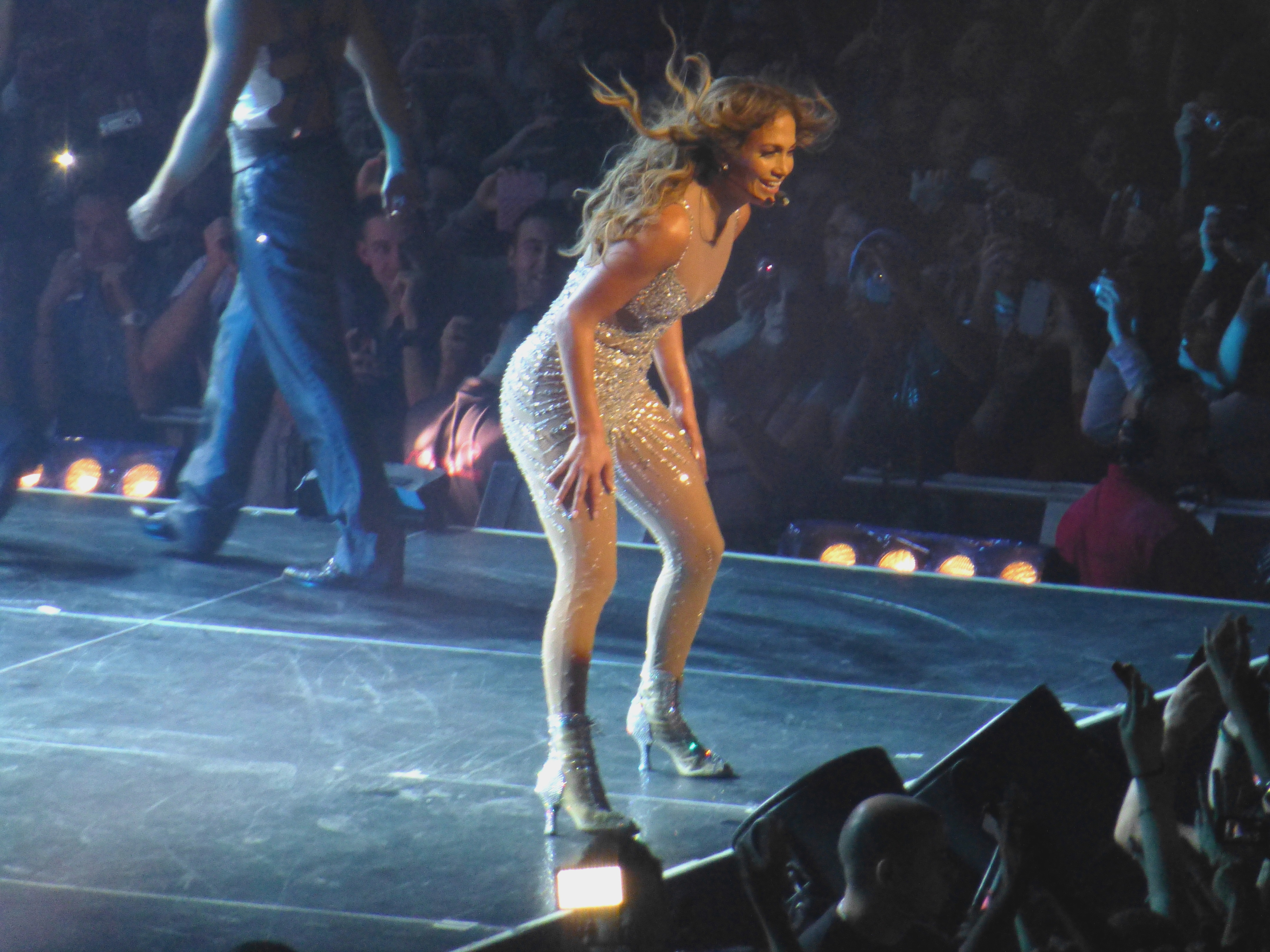 Jennifer LOPEZ en concert à Paris Bercy dans le cadre du " DANCE AGAIN WORLD TOUR " en OCTOBRE 2012